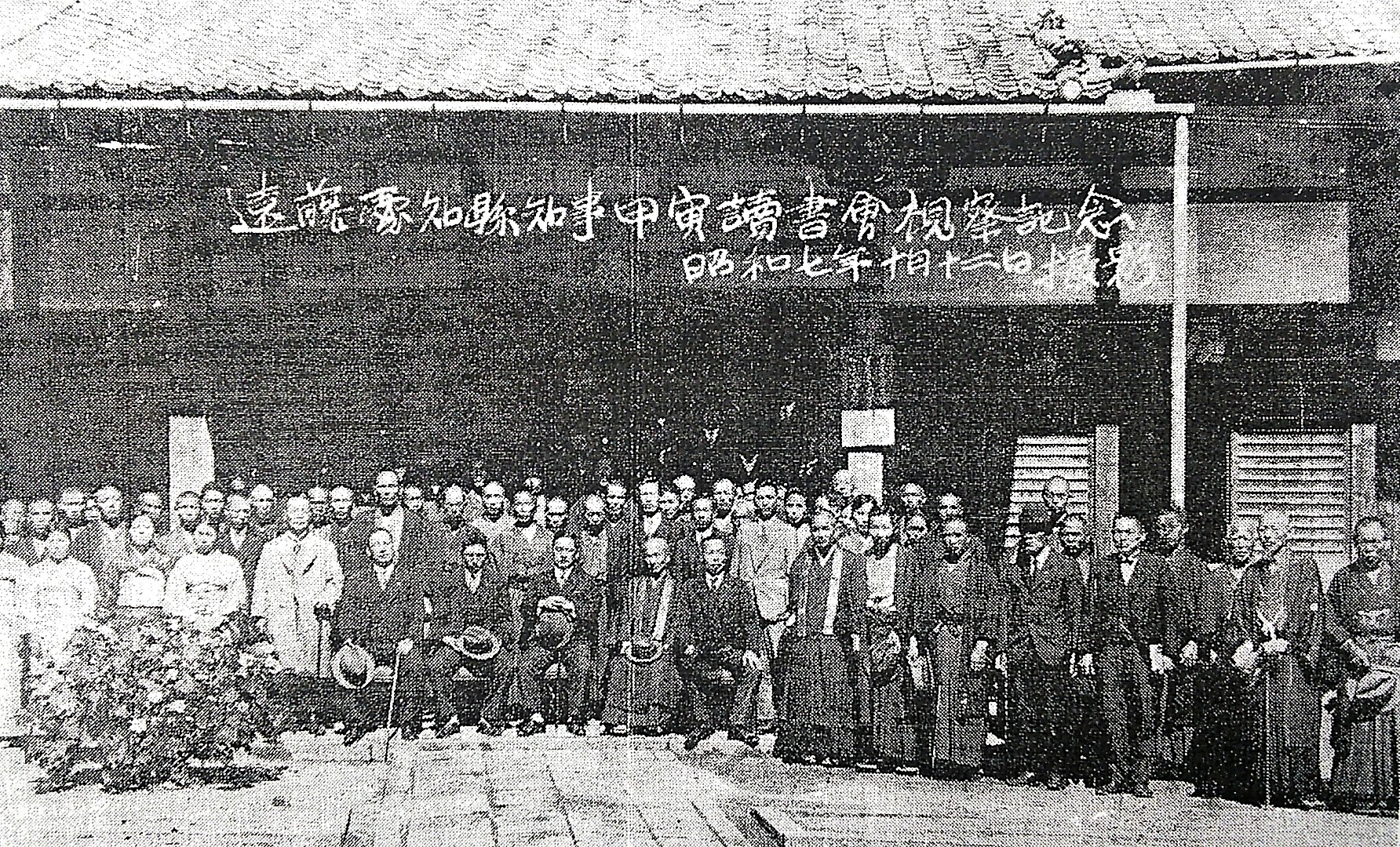 甲寅読書会 遠藤知事視察記念。